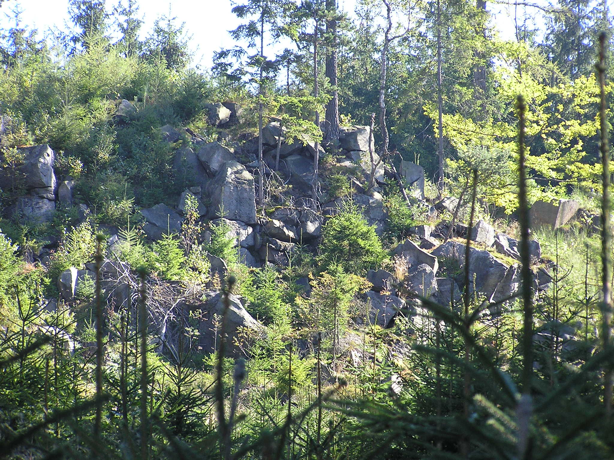 Jedno z mnoha kamenných moří na západním svahu.